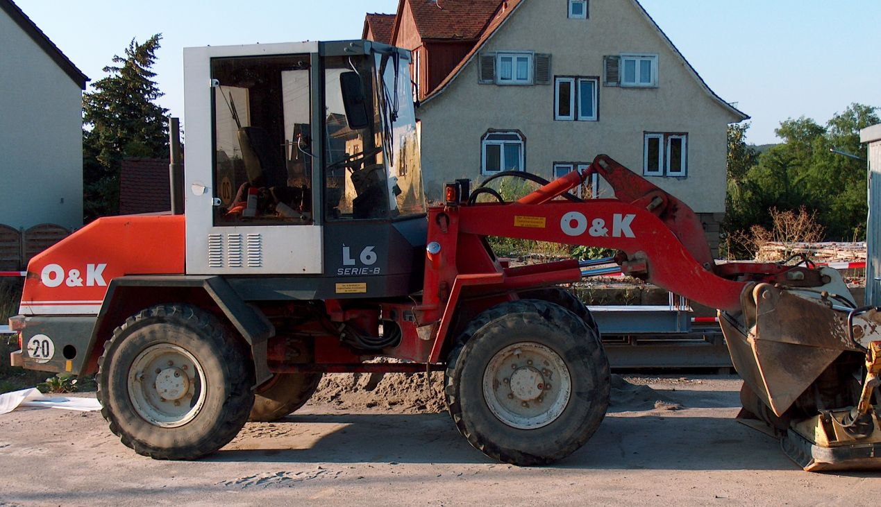 Radlader von O&K, Bj. 1998, Knicklenker